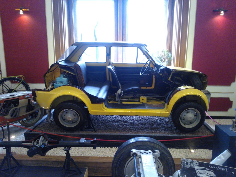 Przekrój Fiata 126p